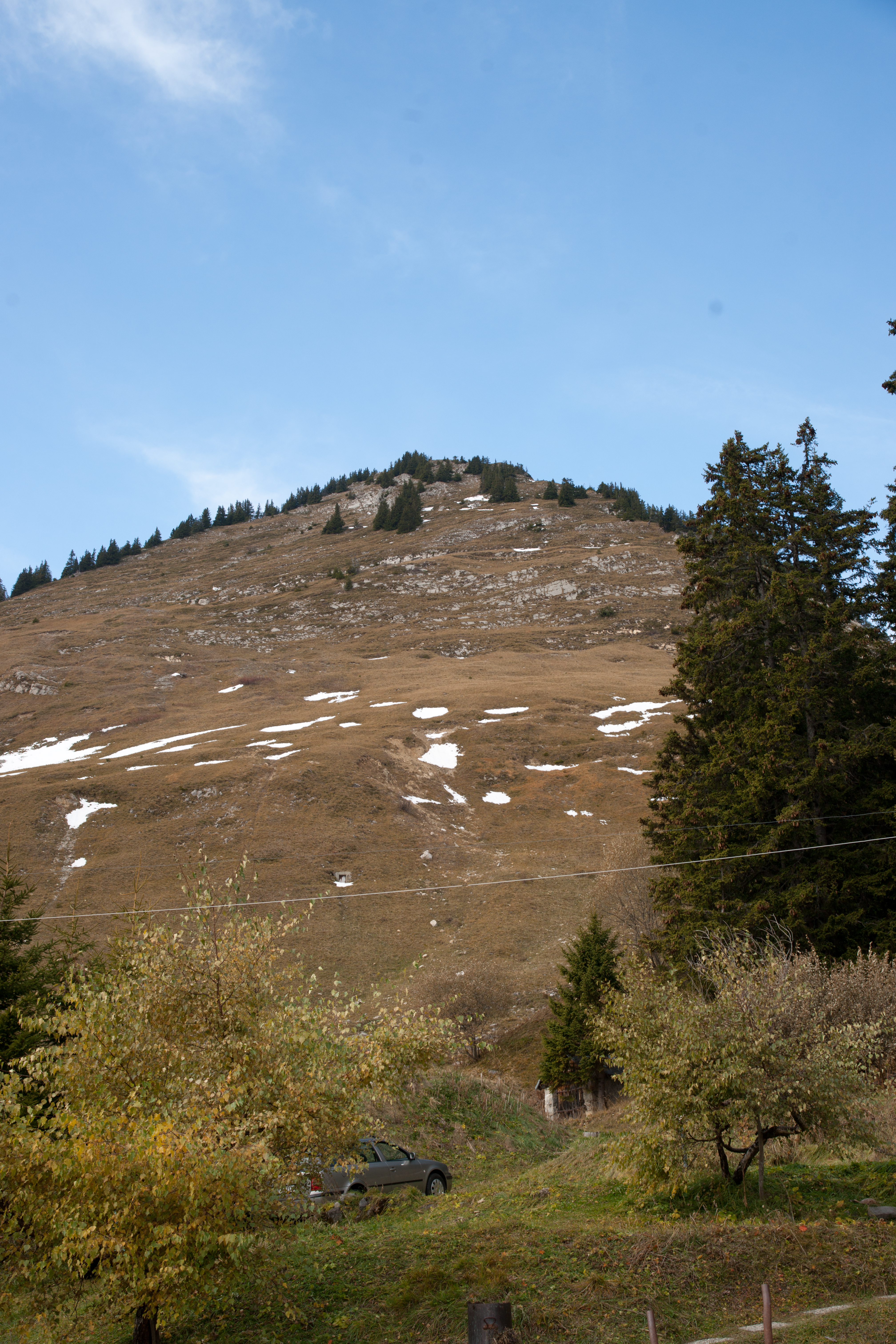 Le Mont d'Or au-dessus de La Comballaz, col des Mosses, canton de Vaud, Suisse.